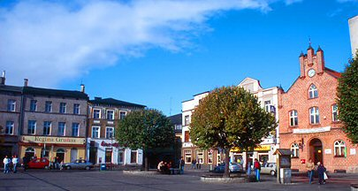 Rynek w Kościerzynie, z prawej zabytkowy ratusz (zabytek nr rejestr. A-1180)